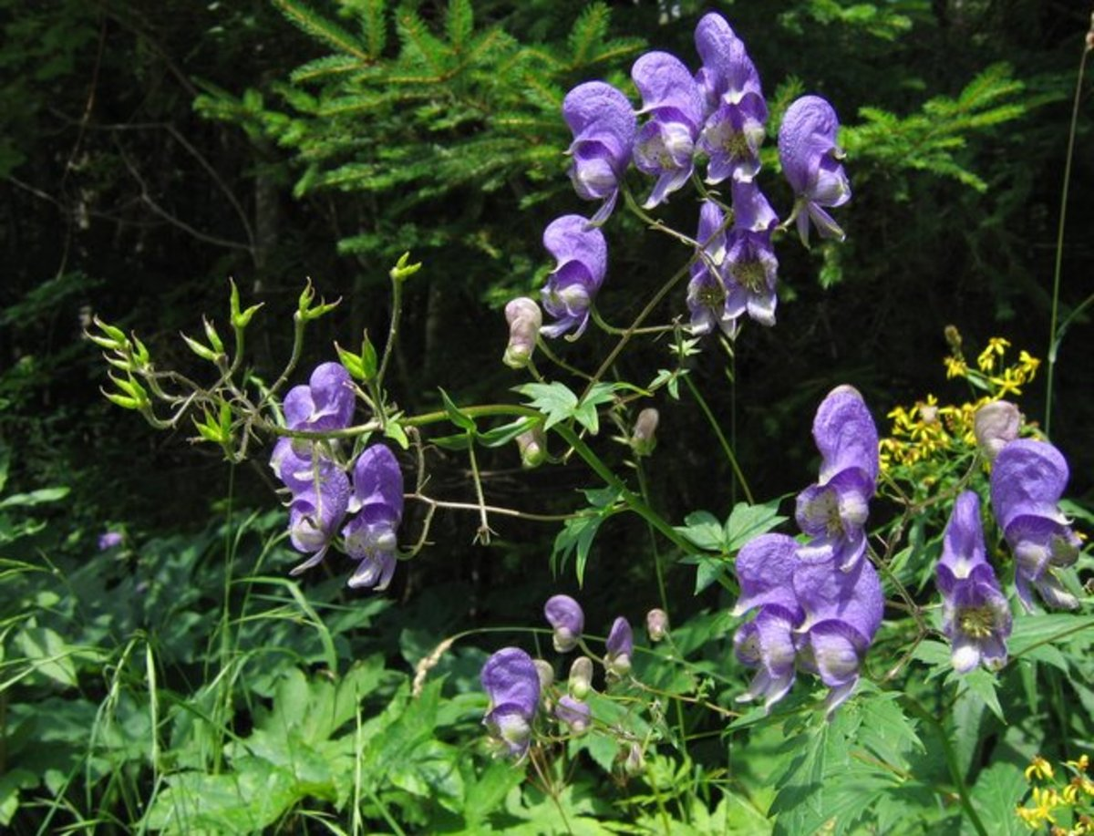 Aconitum degenii at Belska Kočna, 970m